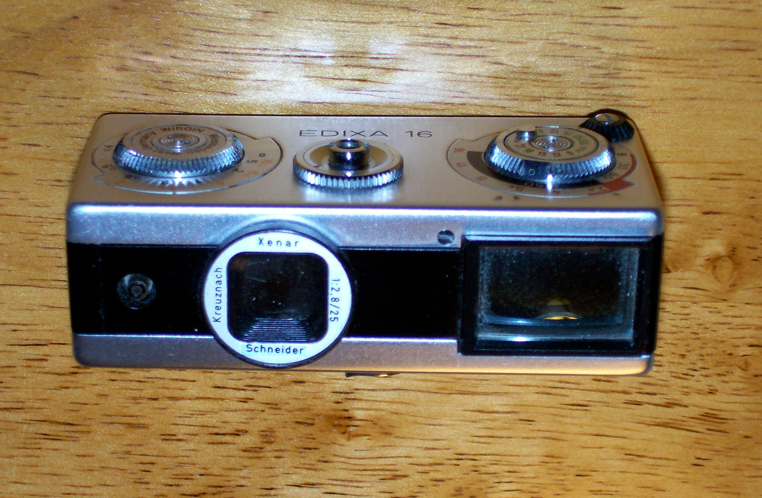 Edixa 16M front view